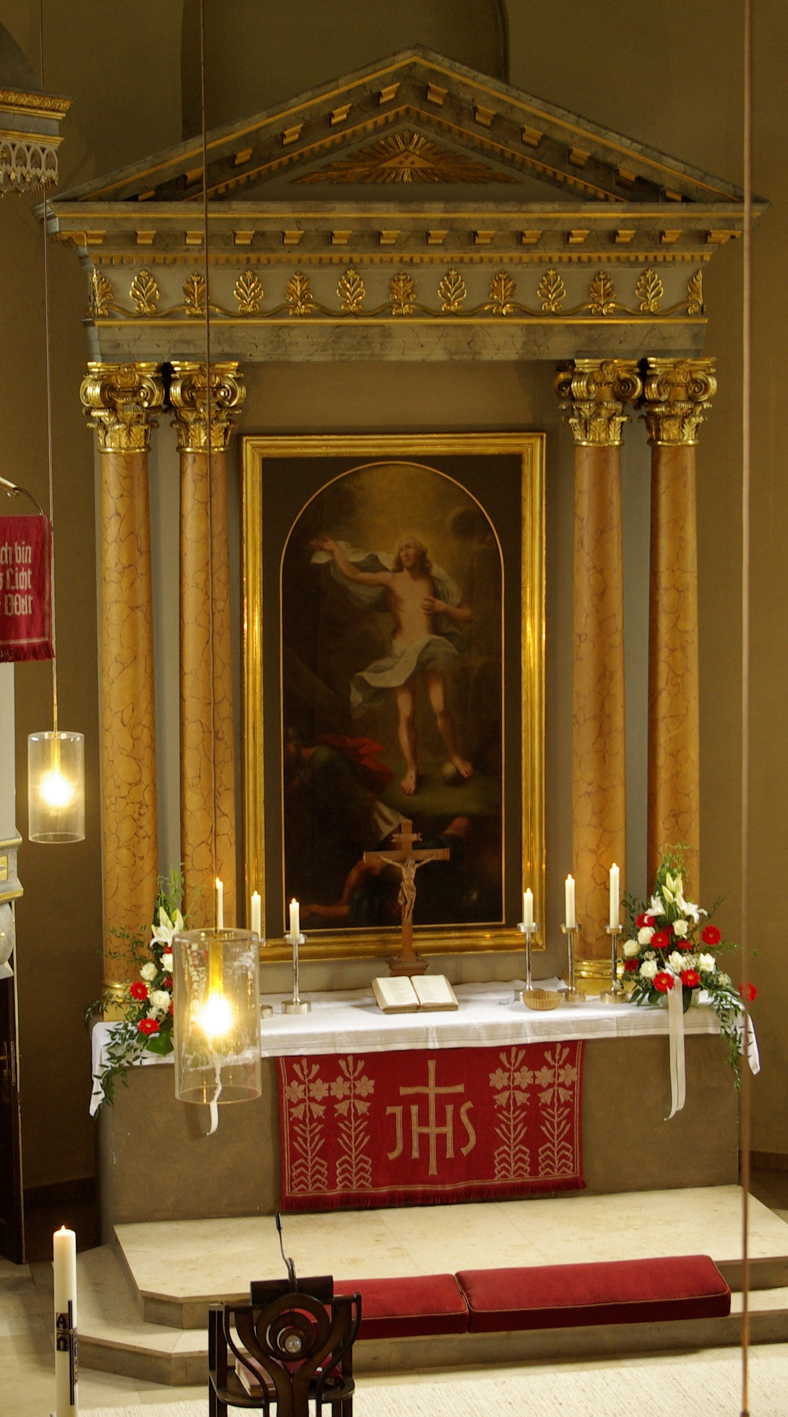 Altar der Auferstehungskirche in Fürth